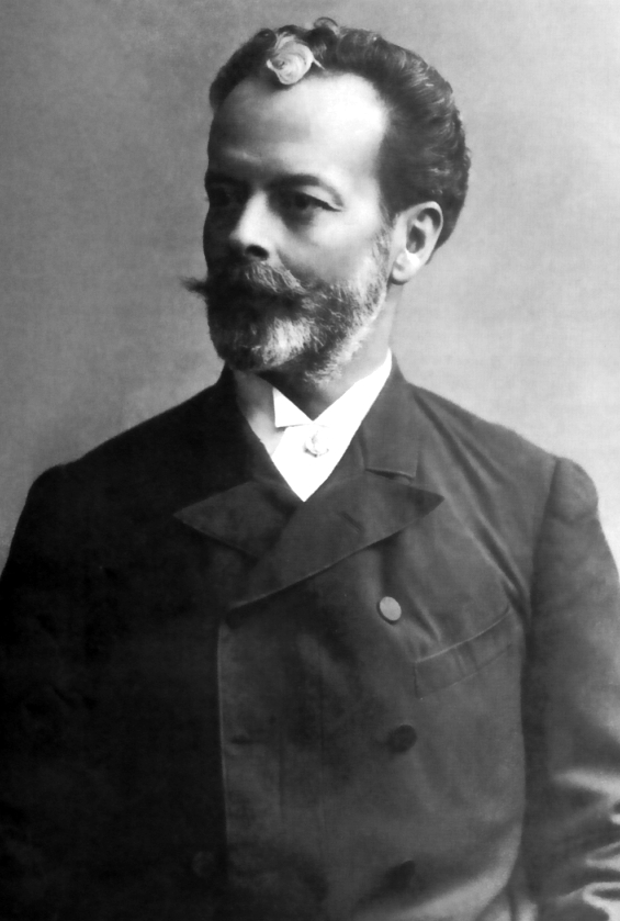 Nicolás Fernández de Piérola Villena(1839 - 1913),político peruano que ocupó la Presidencia del Perú en dos oportunidades, de 1879 a 1881 y de 1895 a 1899.